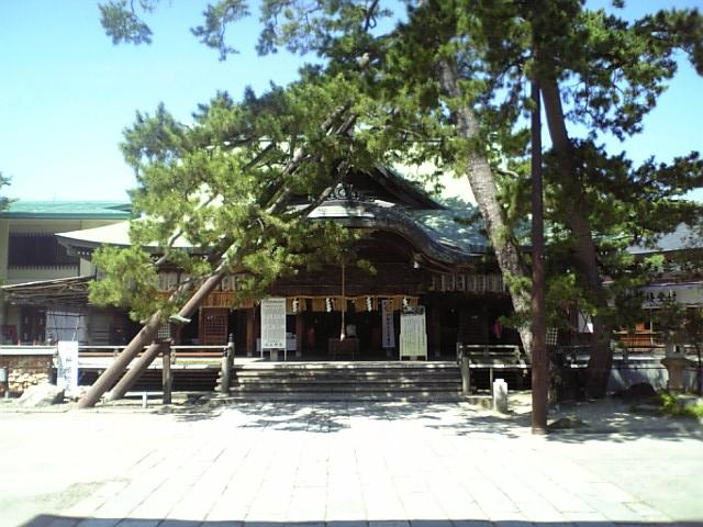 白山神社（新潟市中央区一番堀通町）社殿正面。